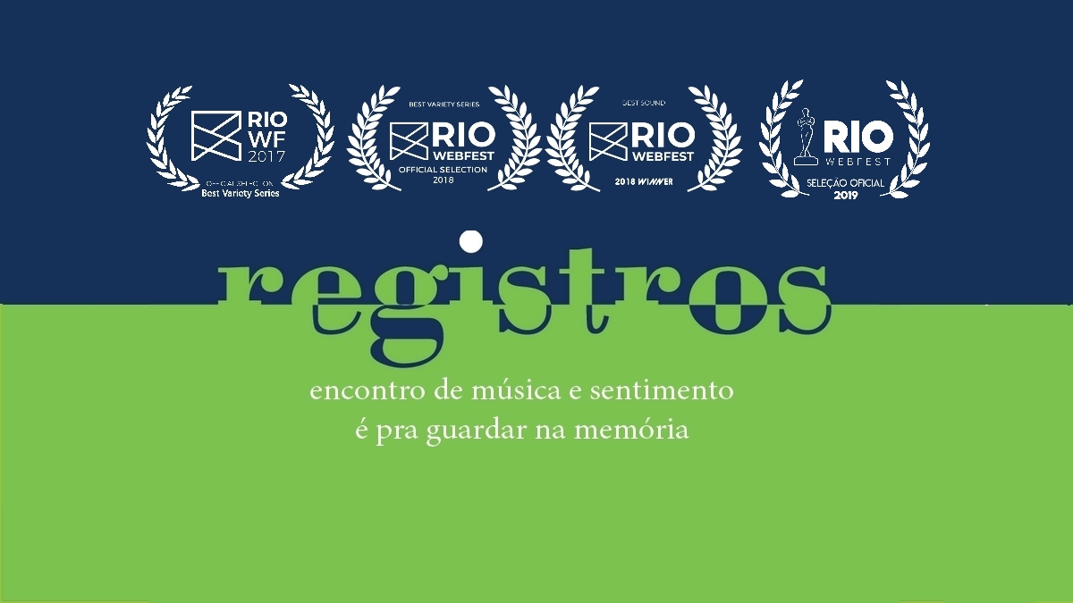 Logomarca do projeto Registros e as indicações ao Rio WebFest